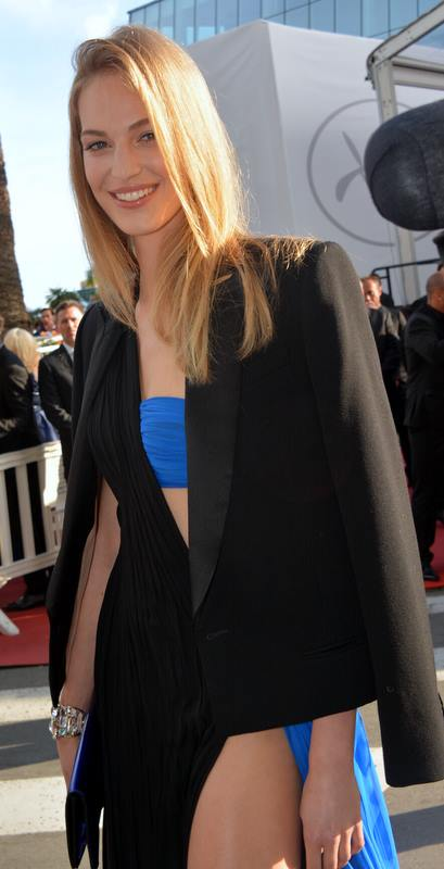 Vanessa Axente au festival de Cannes